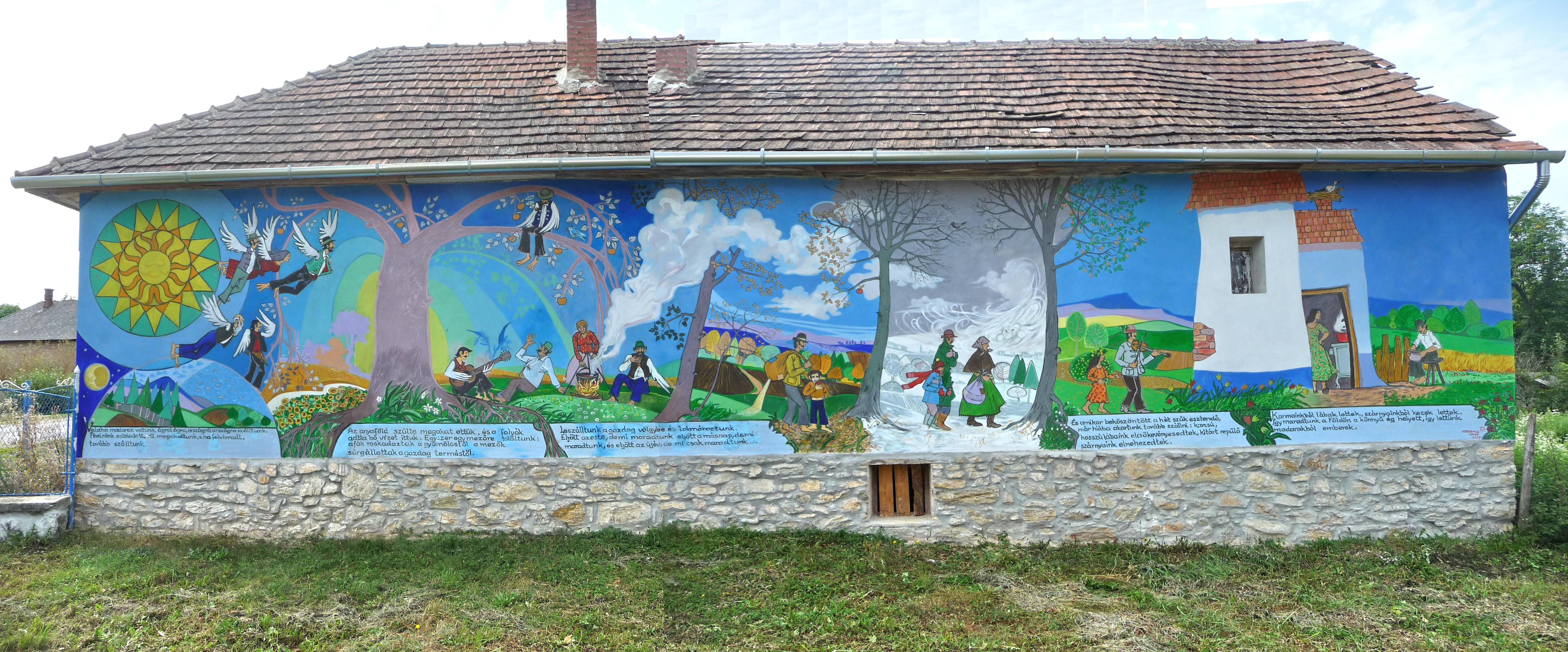 Ferkovics József: Madarak — secco (Bódvalenke)